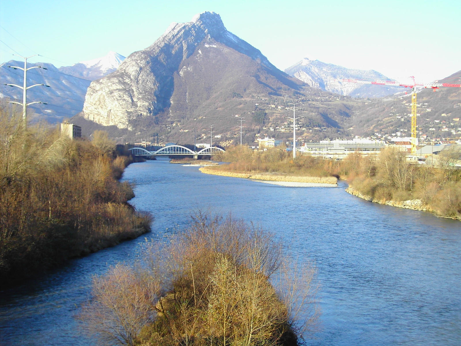 Le Drac au niveau du Pont de Catane. Au fond le pont du Drac. - Grenoble